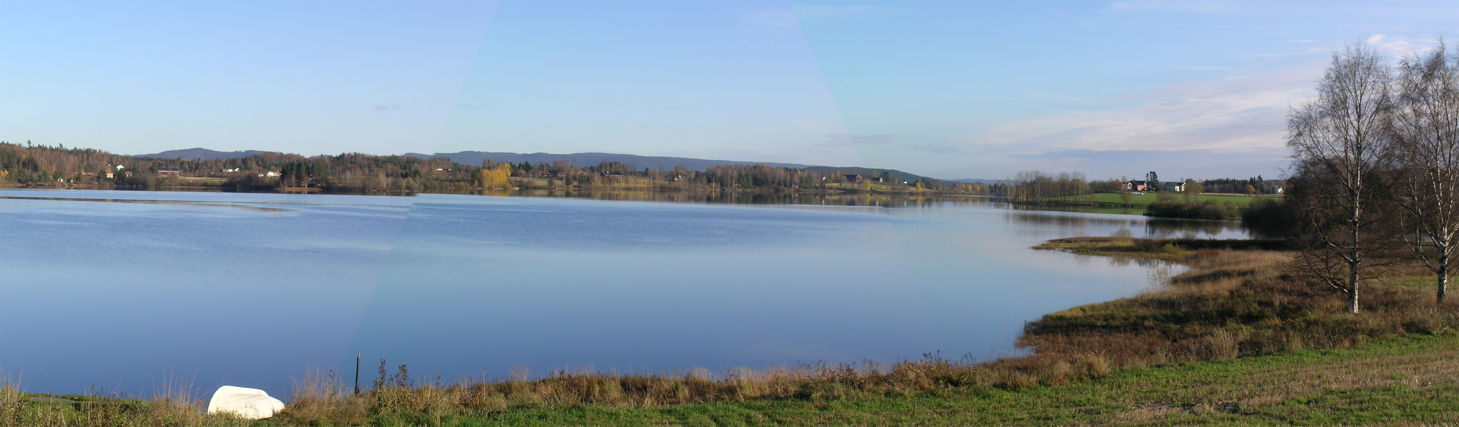 Part of Storsjøen, seen from Sand, Nord-Odal, Hedmark, Norway.